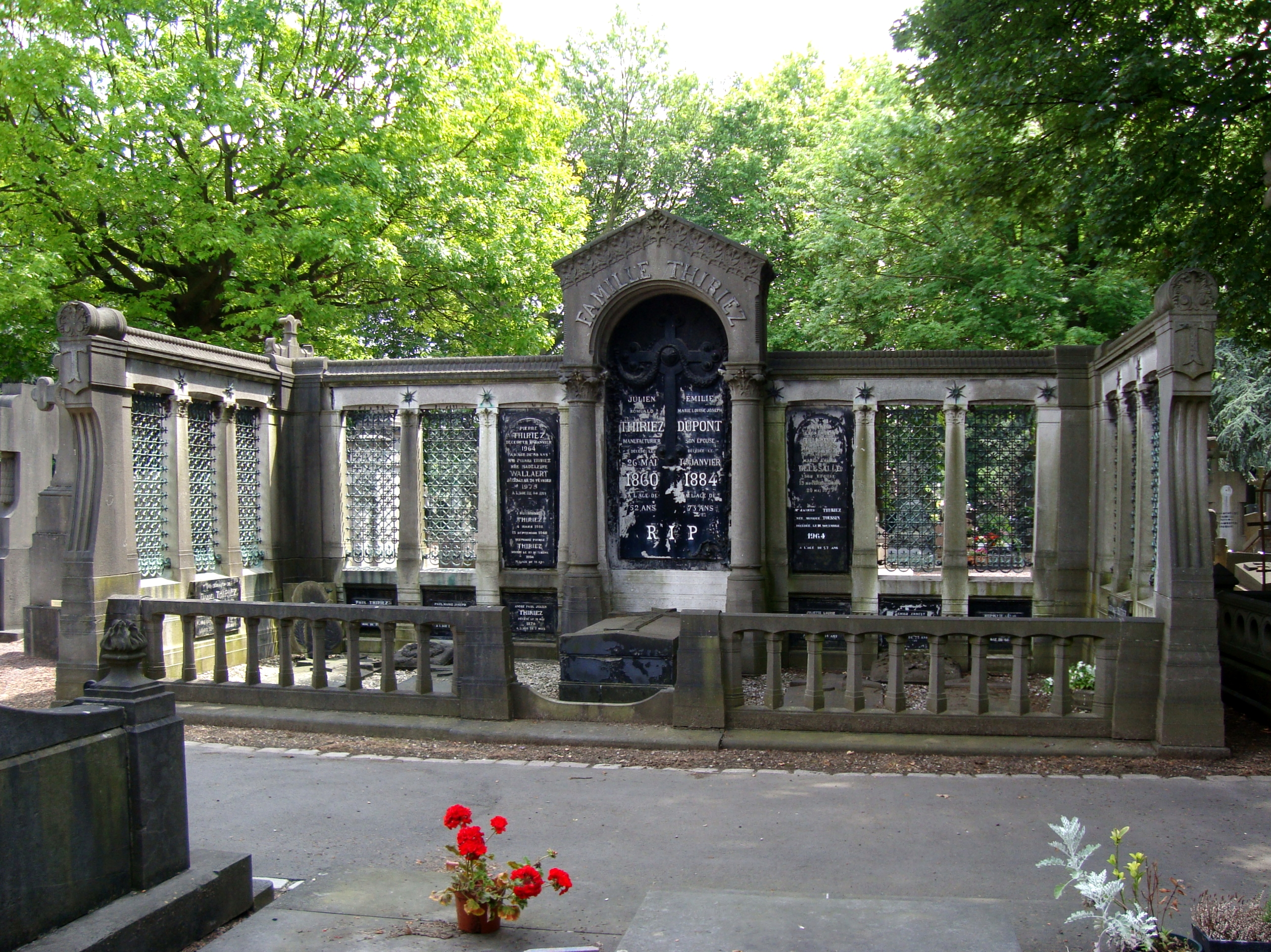 Monument funéraire de la famille Thiriez dans le cimetière du Sud à Lille (Nord).